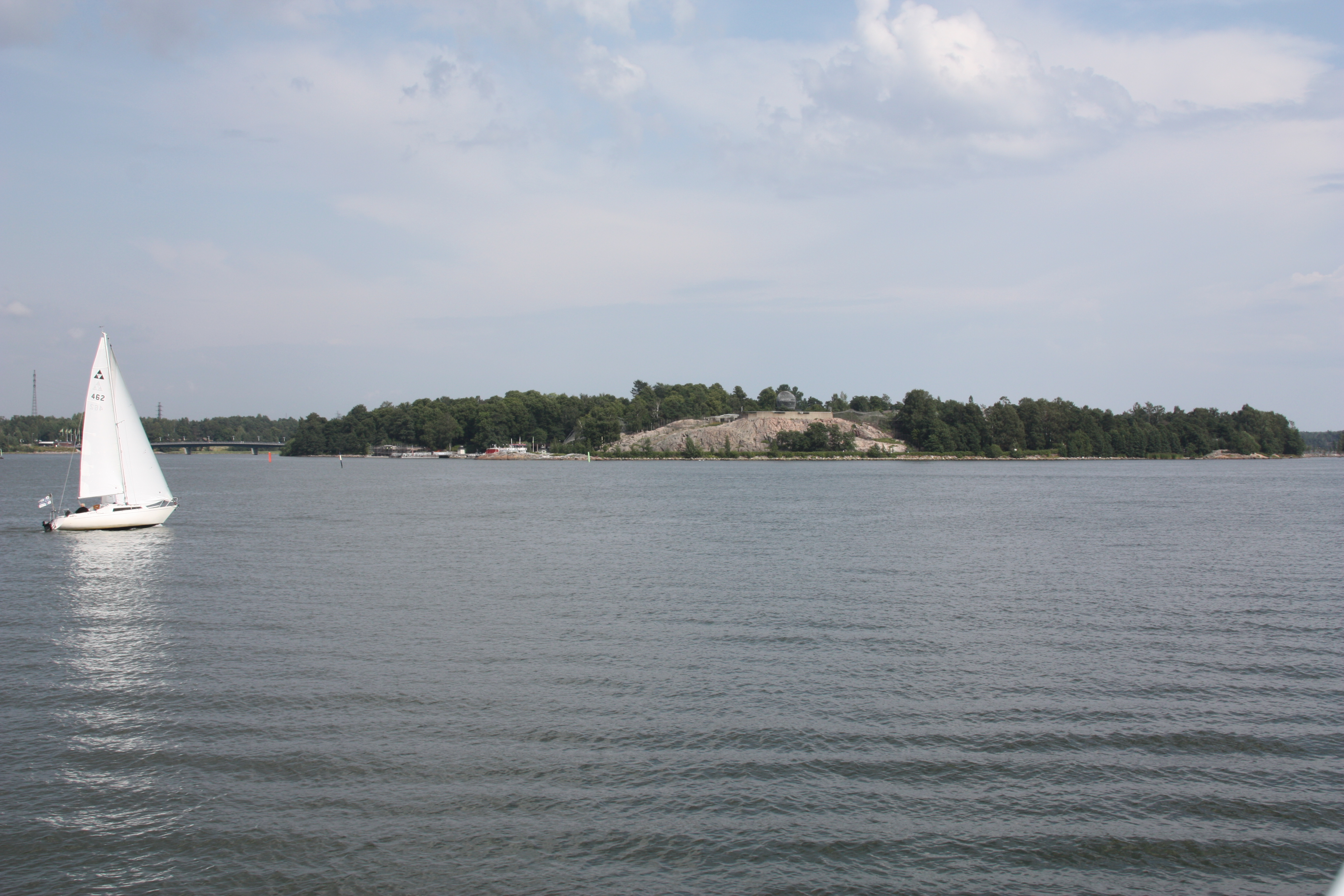 tourist pictures of Helsinki